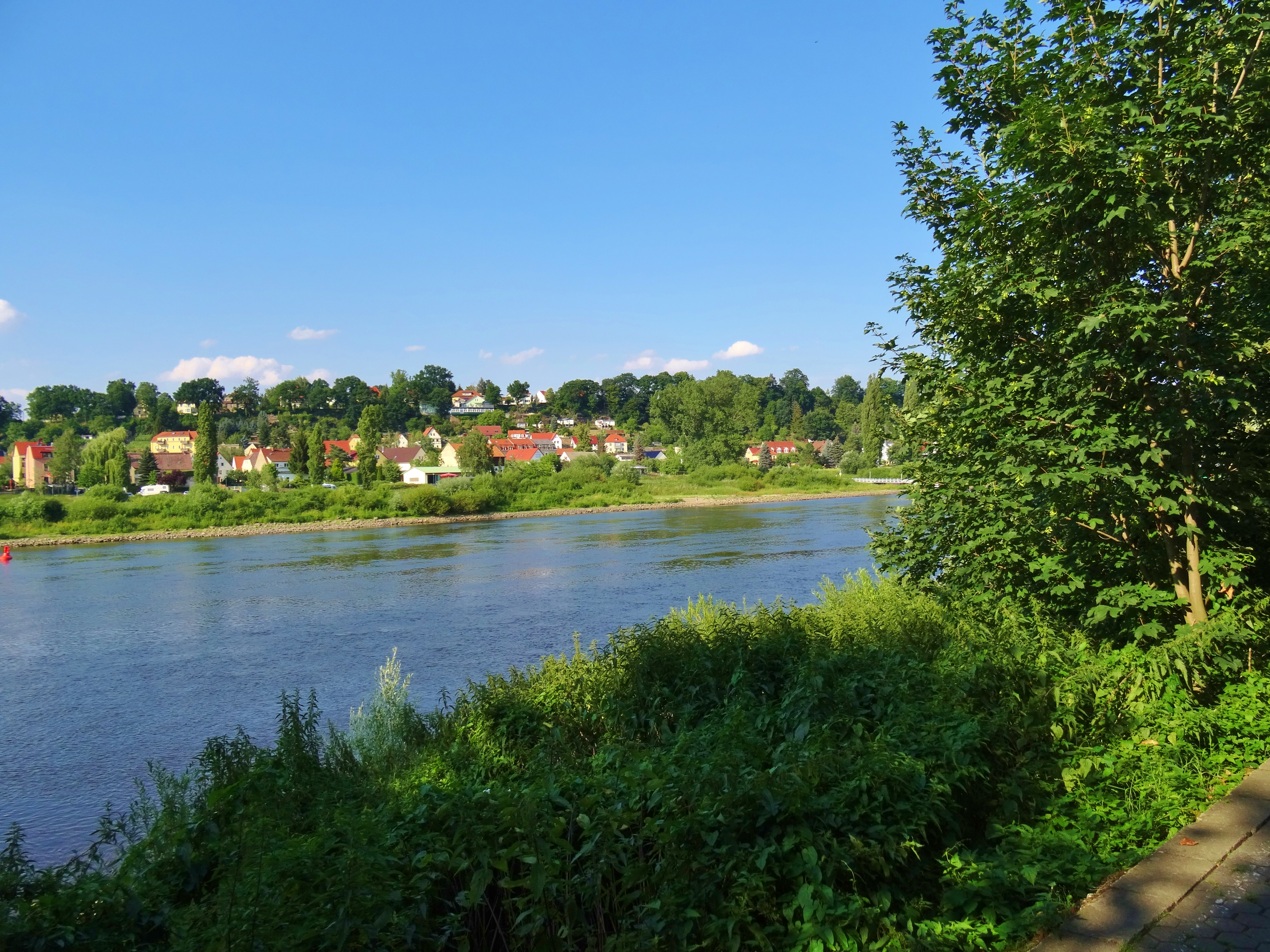 Kohlberg Pirna